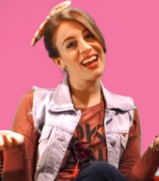 Laura Esquivel en una entrevista en 2017